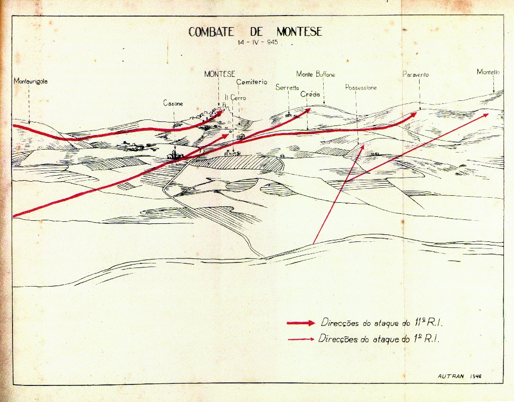 Combate de Montese (14-IV-1945)